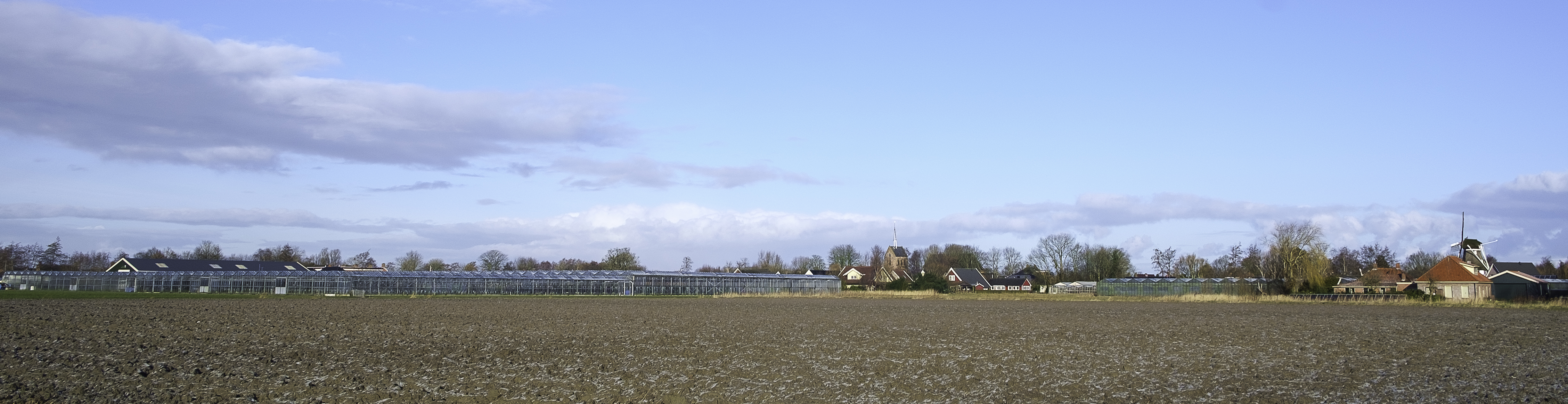 dorpssilhouet van Zandeweer